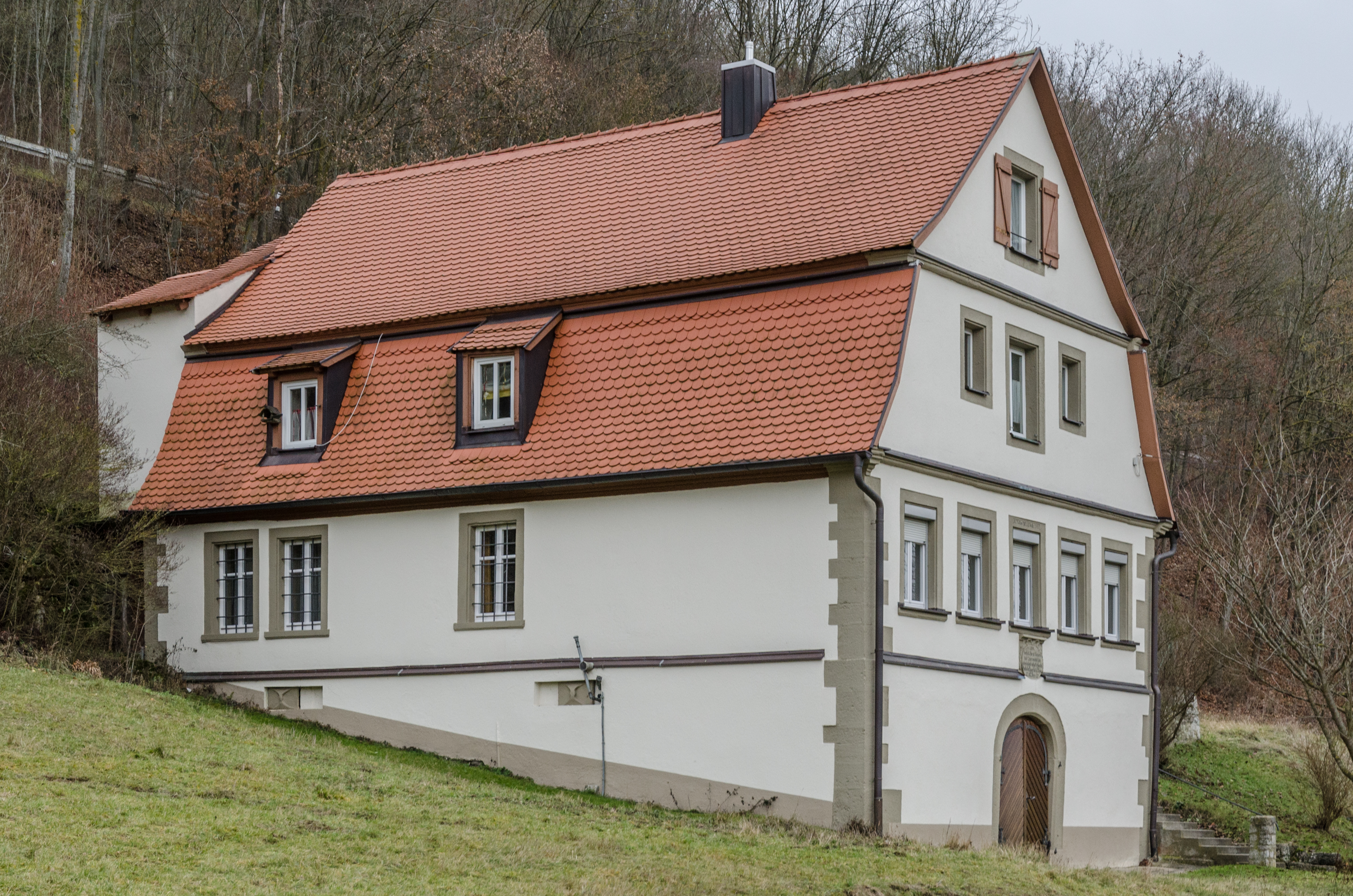 Rothenburg ob der Tauber, Kurze Steig 15